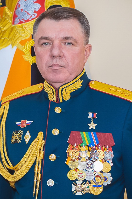 Командующий войсками Западного военного округа генерал-полковник Журавлёв Александр Александрович. Герой Российской Федерации.